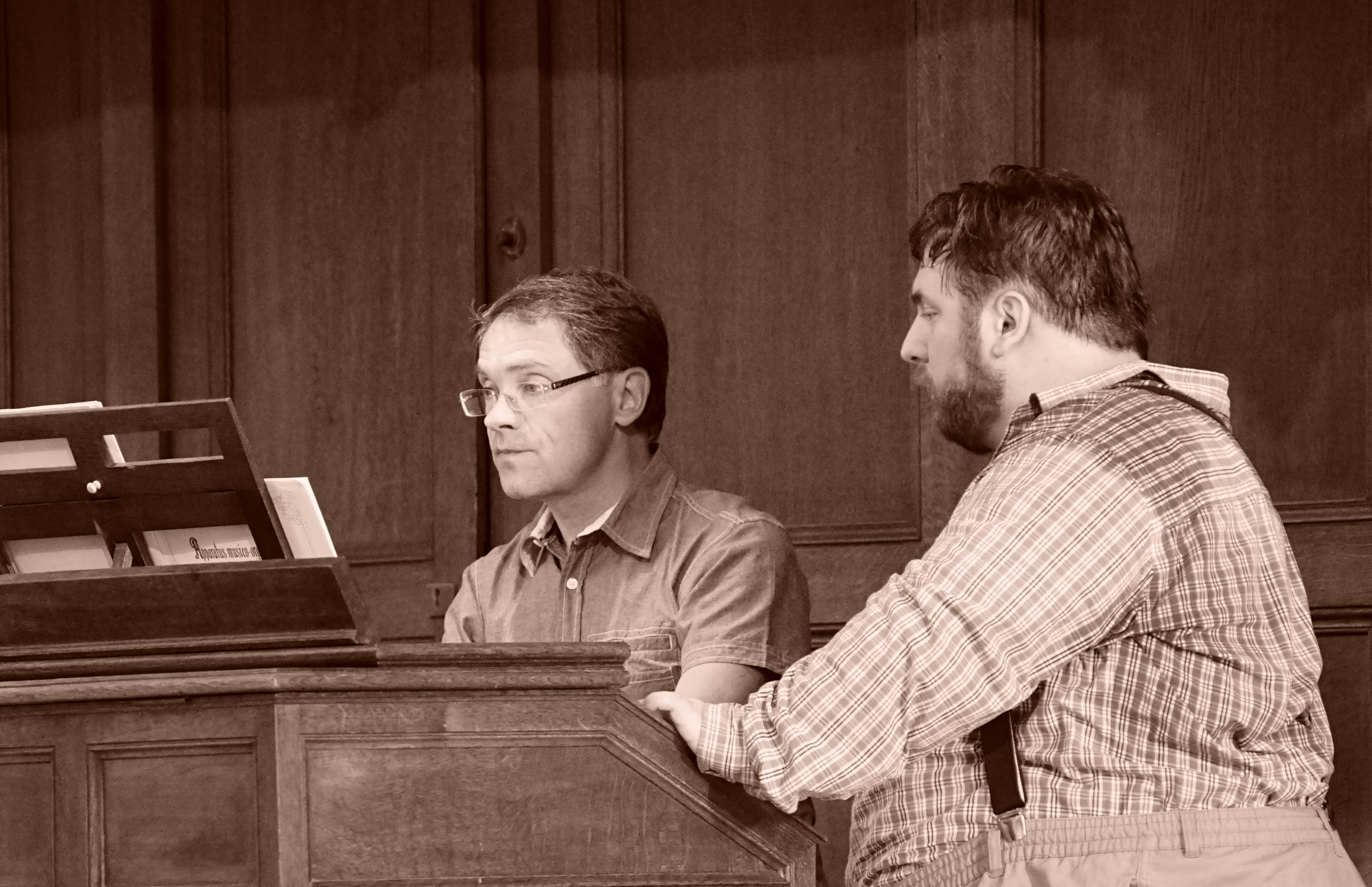 lors des journées du patrimoine.